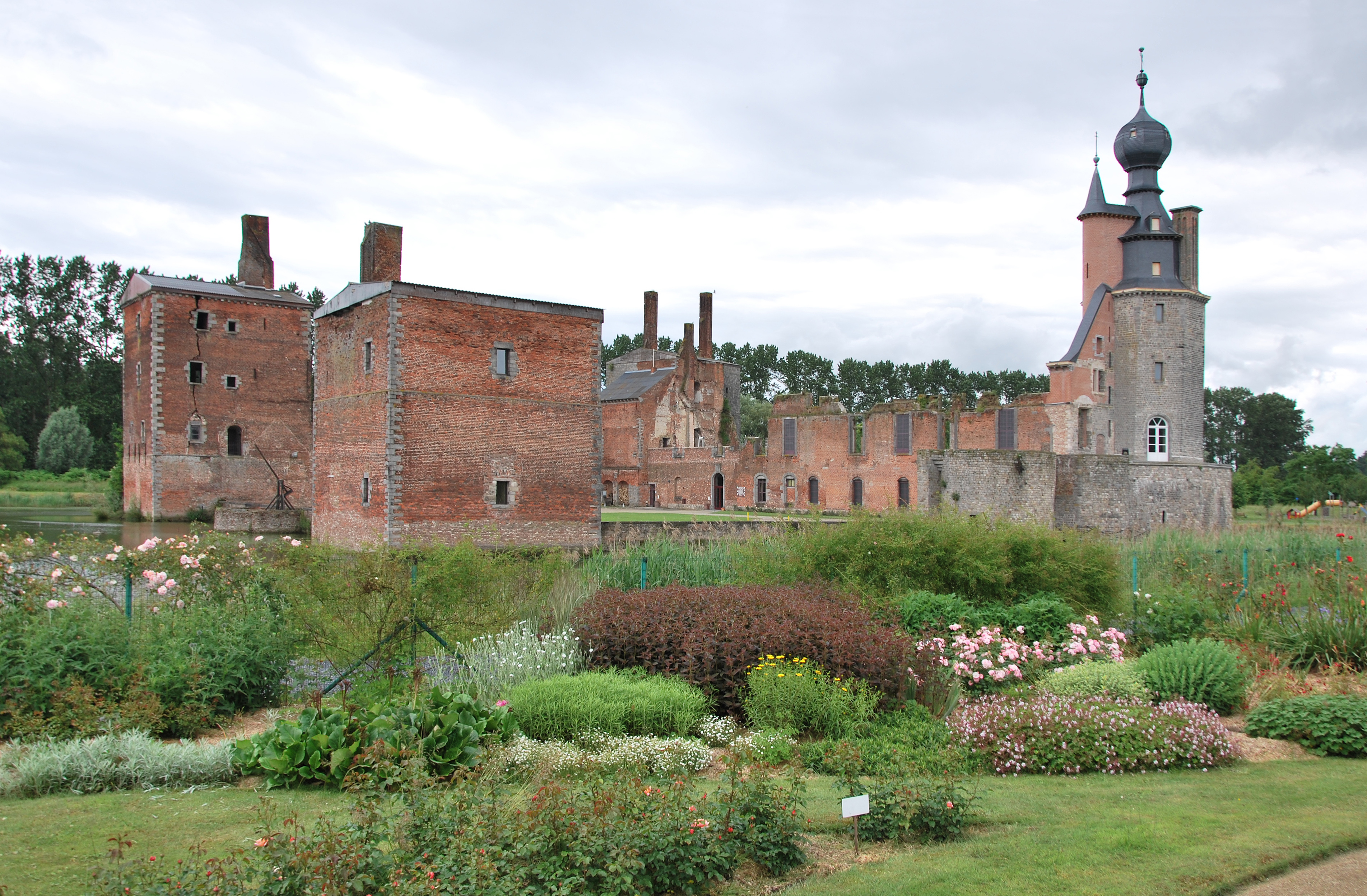 Belgique. Château d'Havré.